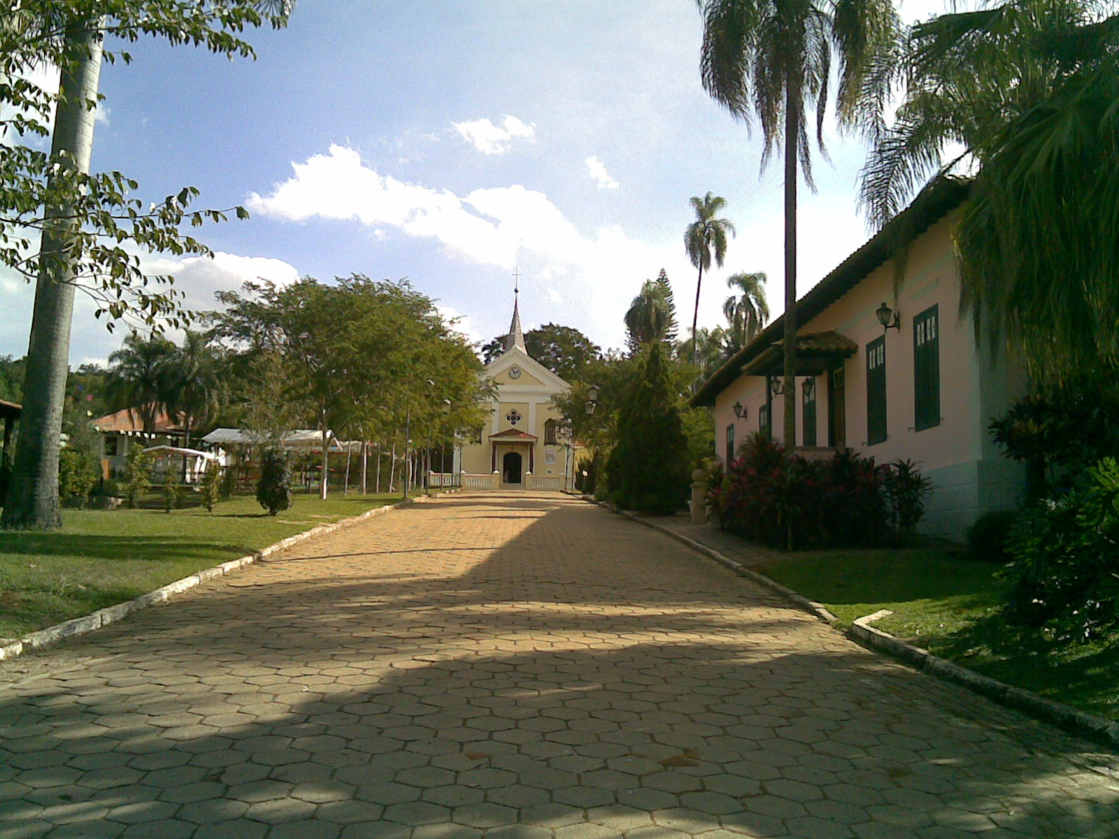 Igreja Matriz de Helvétia em Indaiatuba